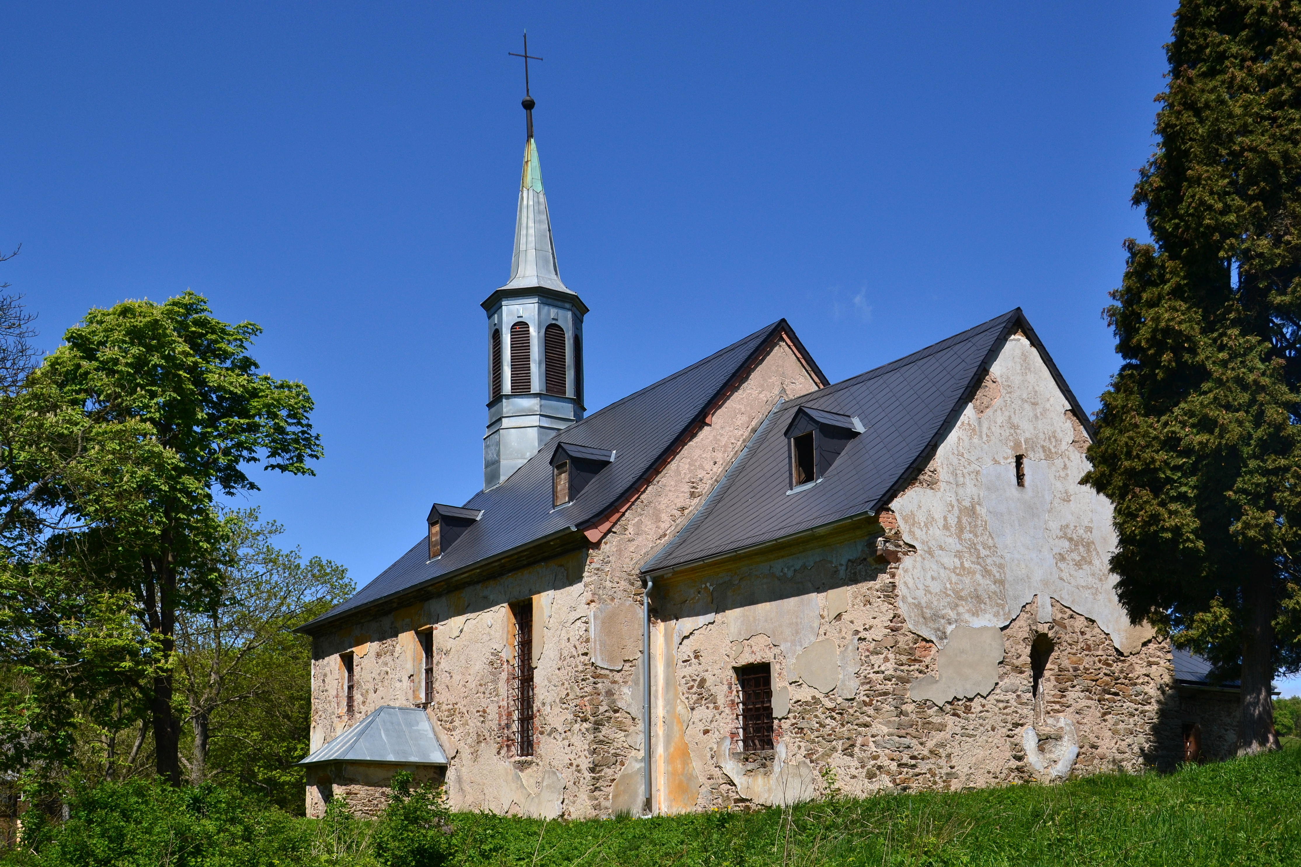 Kostel svatých Petra a Pavla z jihovýchodu